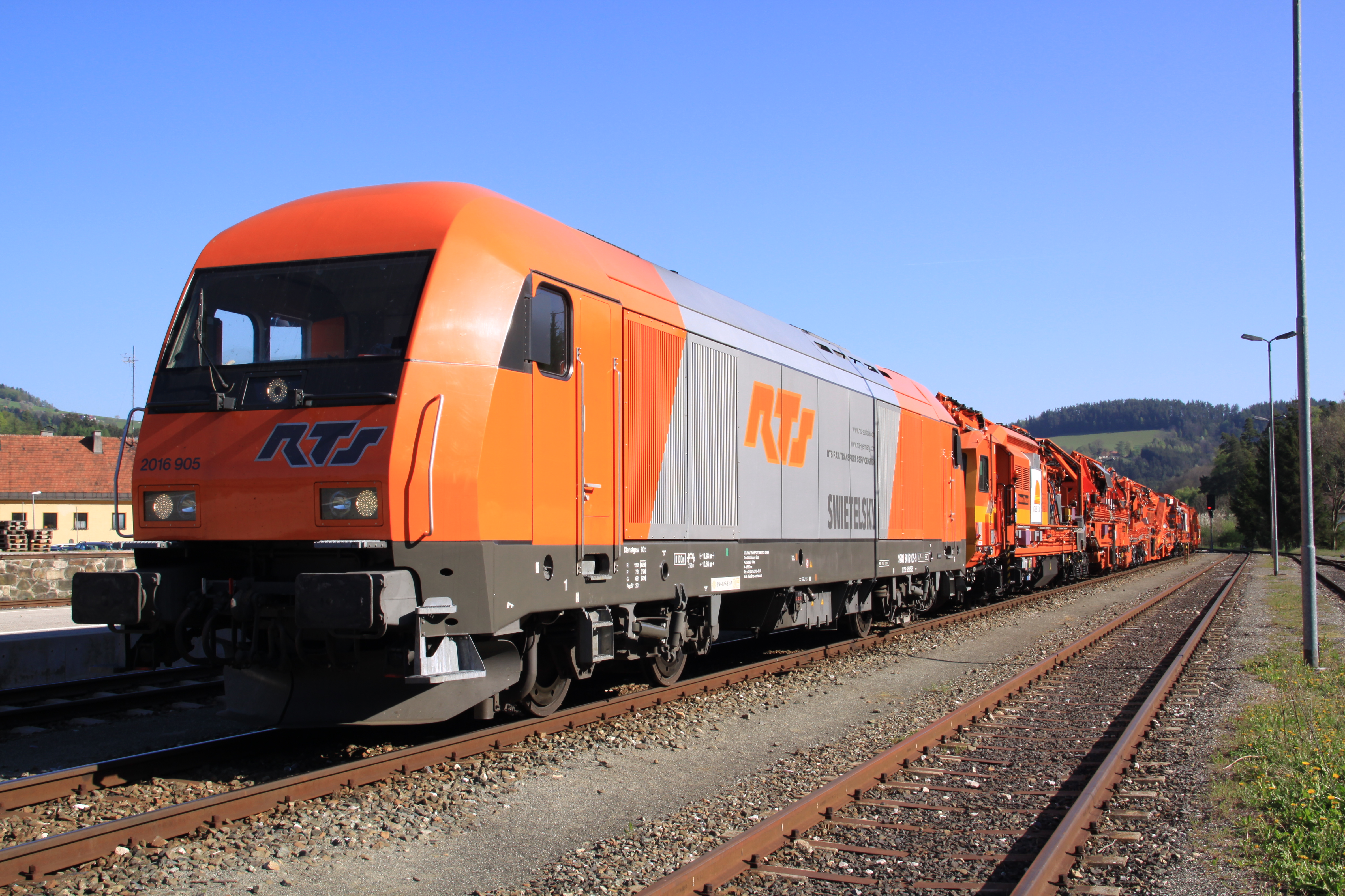 Bettungsreinigungsmaschine „RM 900 - HD 100“ der Firma Plasser & Theurer, Baujahr 2009, anlässlich der Zulassungsfahrt im Bahnhof Aspang (Bild 3)